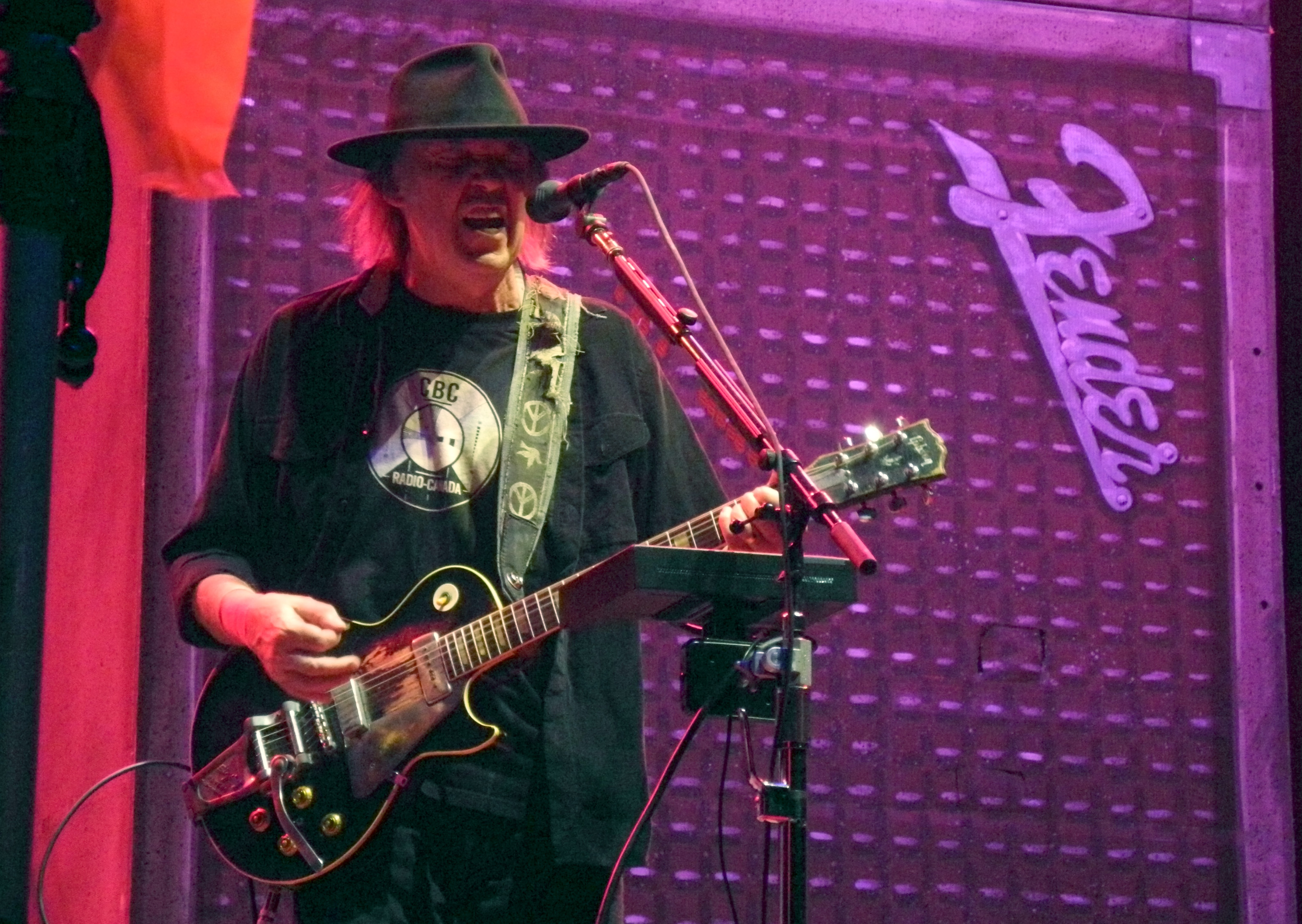 Neil Young in concerto alla Rockhal, Luxembourg